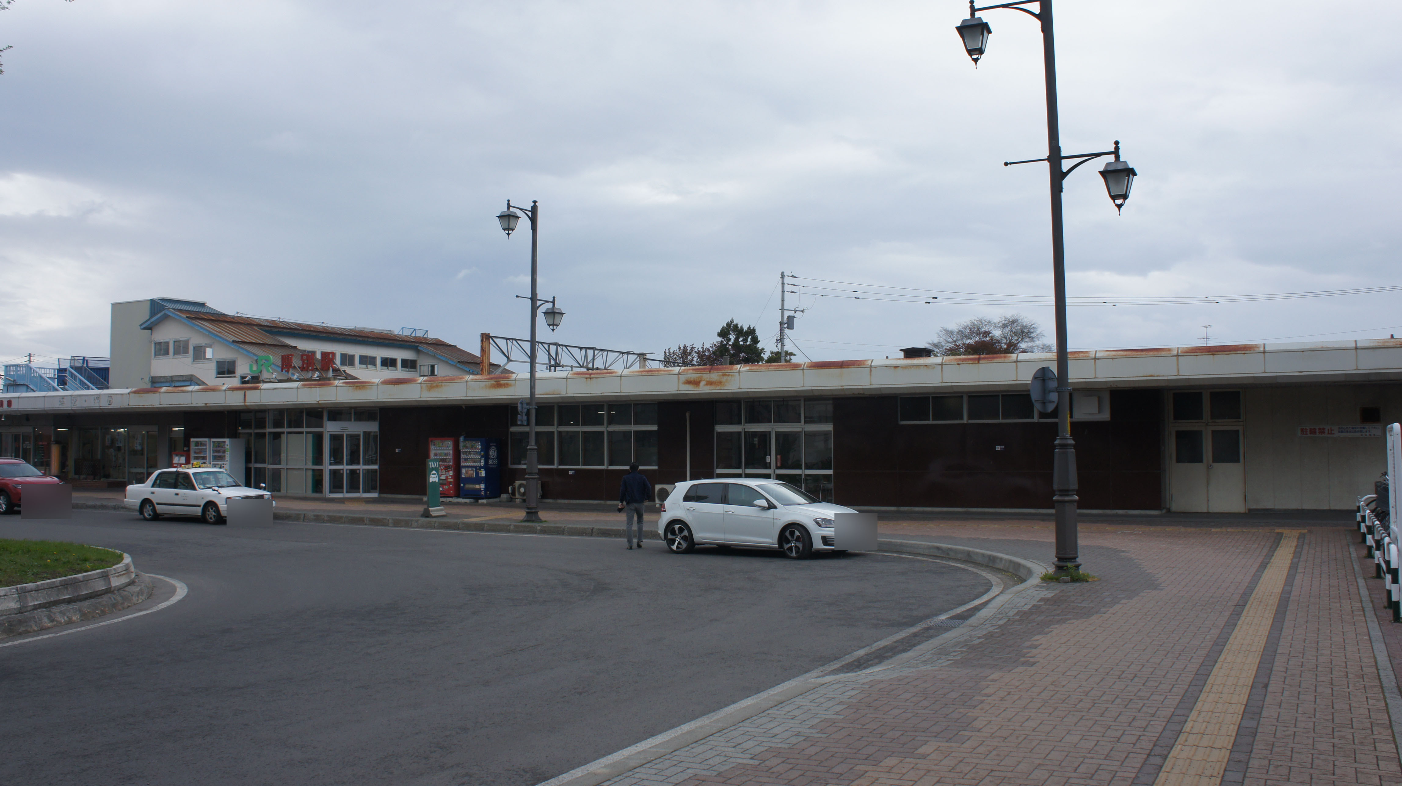 JR函館本線・厚別駅の駅舎 Sony NEX-3